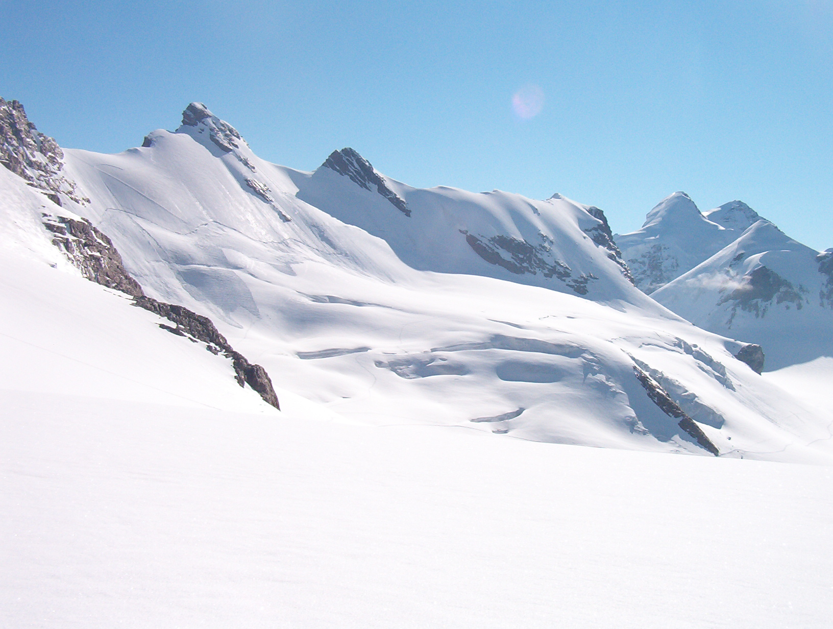 Roccia Nera - Pennine Alps